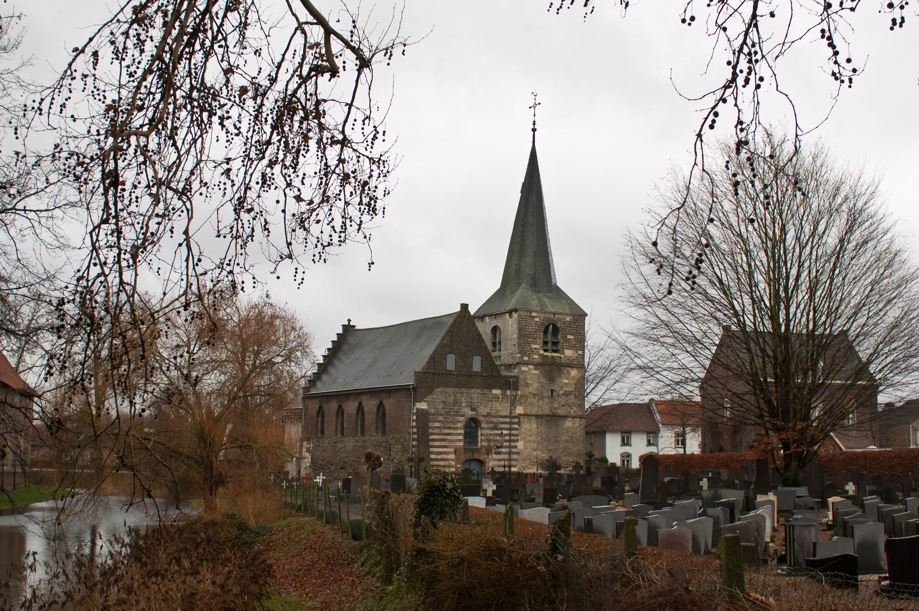 Oude Salviuskerk in Limbricht, Niederlande, Ansicht aus nordöstlicher Richtung